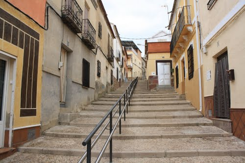 Calle Animas